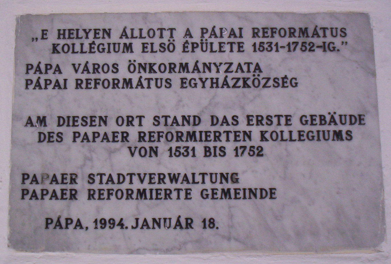 Memorial tablet in Ruszek lane, Pápa, on the place of the first building of the Pápa Reformed College Emléktábla a pápai Ruszek közben, a Pápai Református Kollégium első épületének a helyén